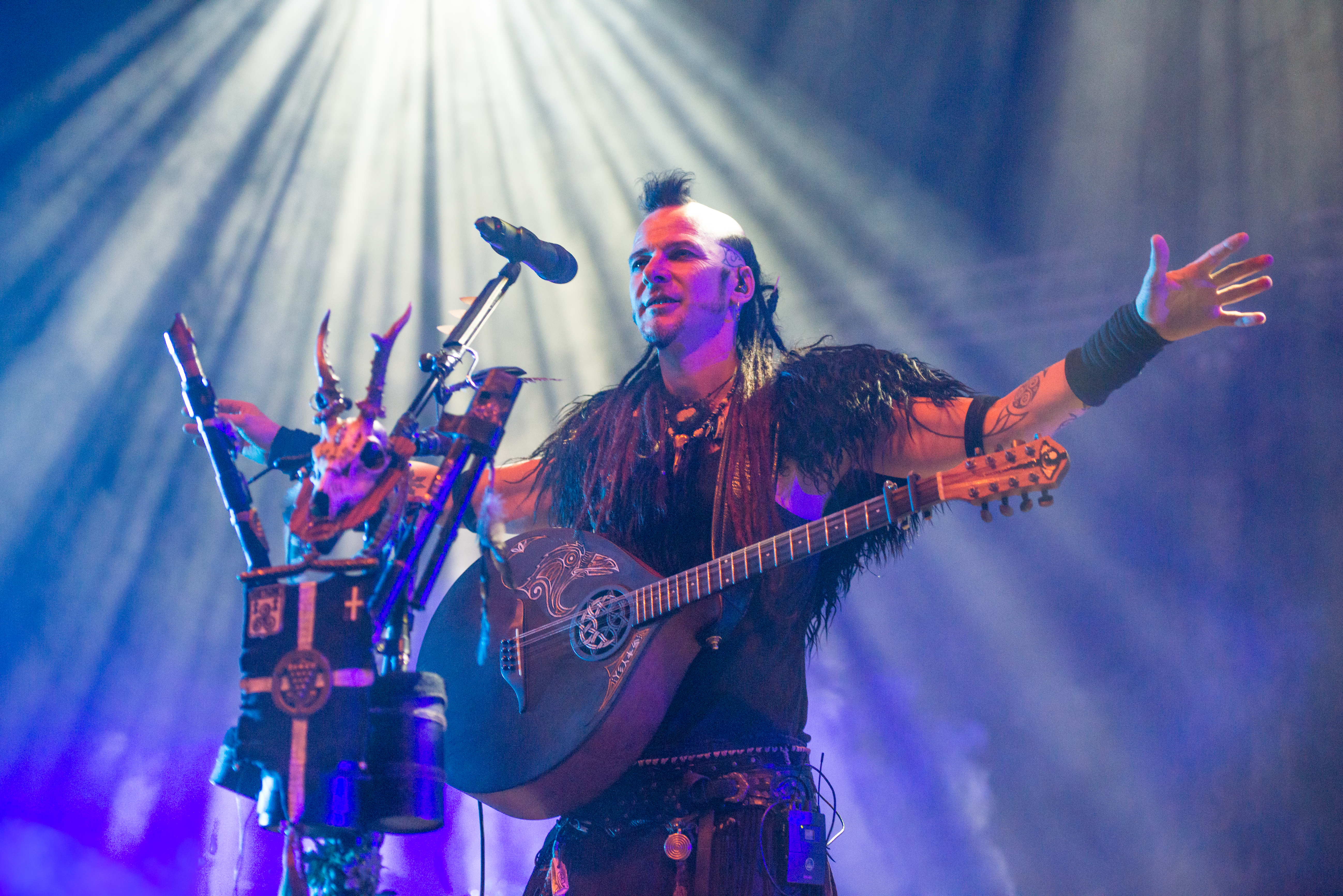 'Mittelalterlich Phantasie Spectaculum 2014': 'Omnia'